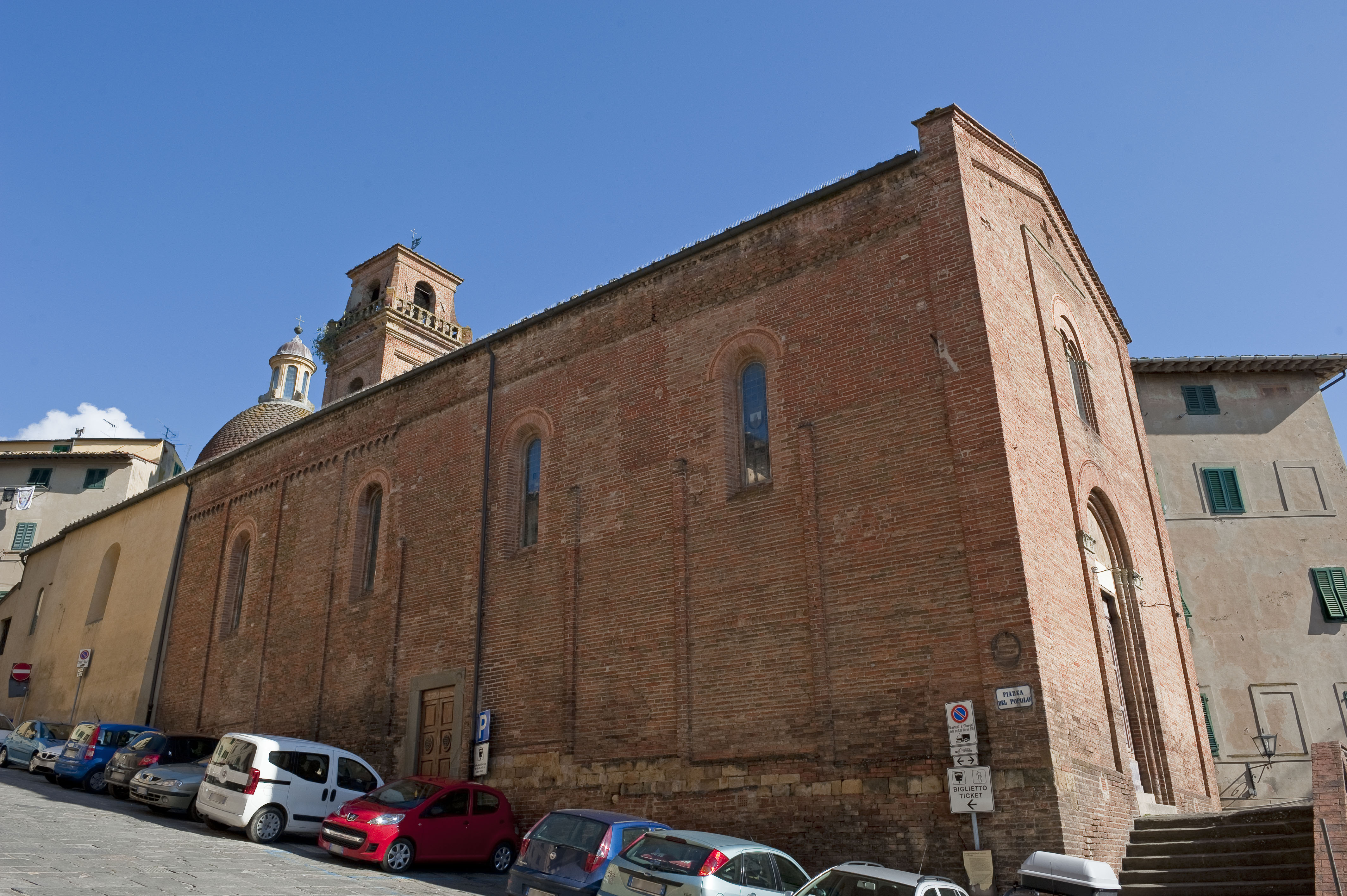 Fiancata sinistra della Collegiata dei Santi Lorenzo e Leonardo a Castelfiorentino